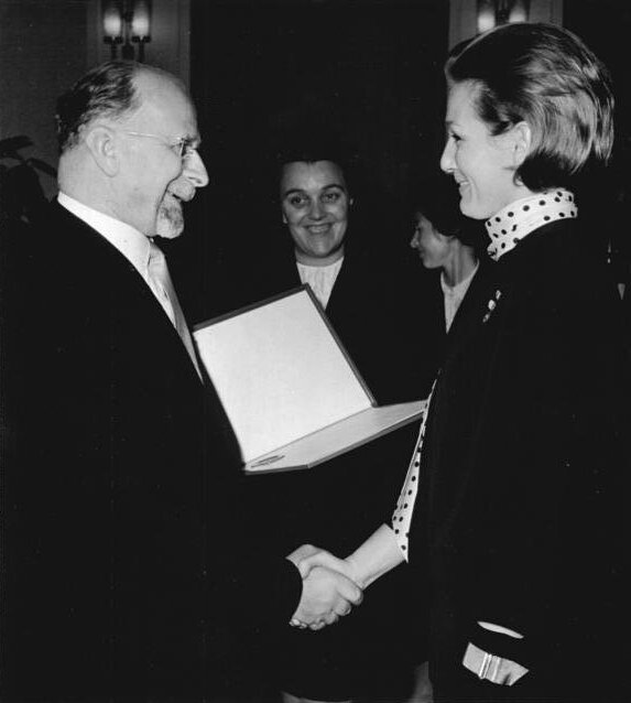 Zentralbild-Junge-Sturm -6.10.1961 Walter Ulbricht verlieh Nationalpreis 1961. Den Nationalpreis 1961 verlieh der Vorsitzende des Staatsrates der Deutschen Demokratischen Republik, Walter Ulbricht, am Vorabend des 12. Jahrestages der Gründung der DDR 46 hervorragenden Persönlichkeiten und Kollektiven aus allen Gebieten des gesellschaftlichen Lebens. Auf einem festlichen Auszeichnungsakt am Vormittag des 6.10.1961 im Amtssitz des Staatsrates in Berlin-Niederschönhausen nahmen die Männer und Frauen, die sich durch großartige Leistungen zum Nutzen der Republik höchste Anerkennung erworben haben, aus der Hand Walter Ulbrichts den Nationalpreis entgegen. UBz. Walter Ulbricht (links) zeichnet Inge Keller vom Kollektiv des Fernsehfilmwerks "Gewissen in Aufruhr" mit dem Nationalpreis I. Klasse für Kunst und Literatur aus.